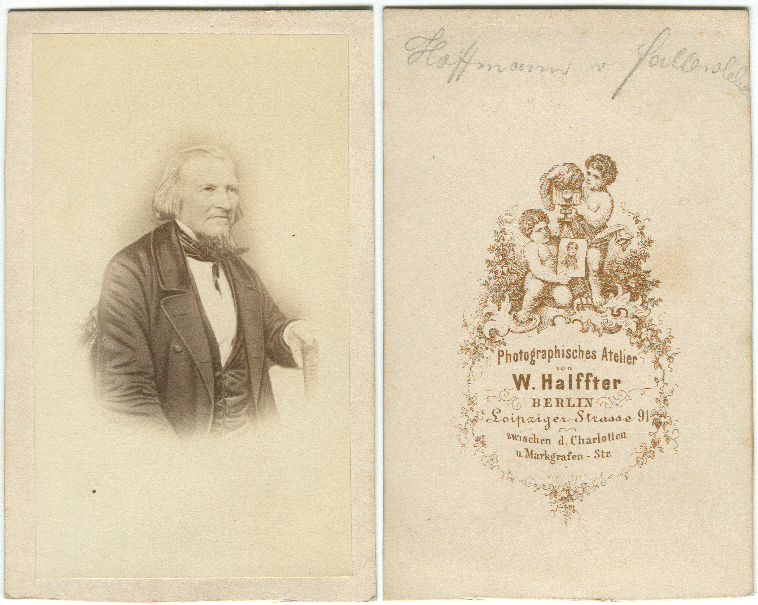 Wilhelm Halffter, Leipziger Strasse 91, Berlin: Hoffmann von Fallersleben; Carte-de-visite, um 1860 (?), Privatbesitz. Grösse des leicht unregelmäßig per Hand geschnittenen und auf der Rückseite mit einem bräunlichen Zier-Logo des Ateliers bedruckten Kartons circa 9,7 cm x 6,1 cm; Grösse des (Albumin-?) Fotopapiers circa 8,9 cm x 5,2 cm. --Bernd Schwabe in Hannover (talk) 18:43, 24 December 2009 (UTC